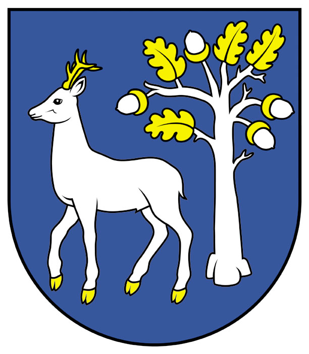 erb obce Sedliacka Dubová